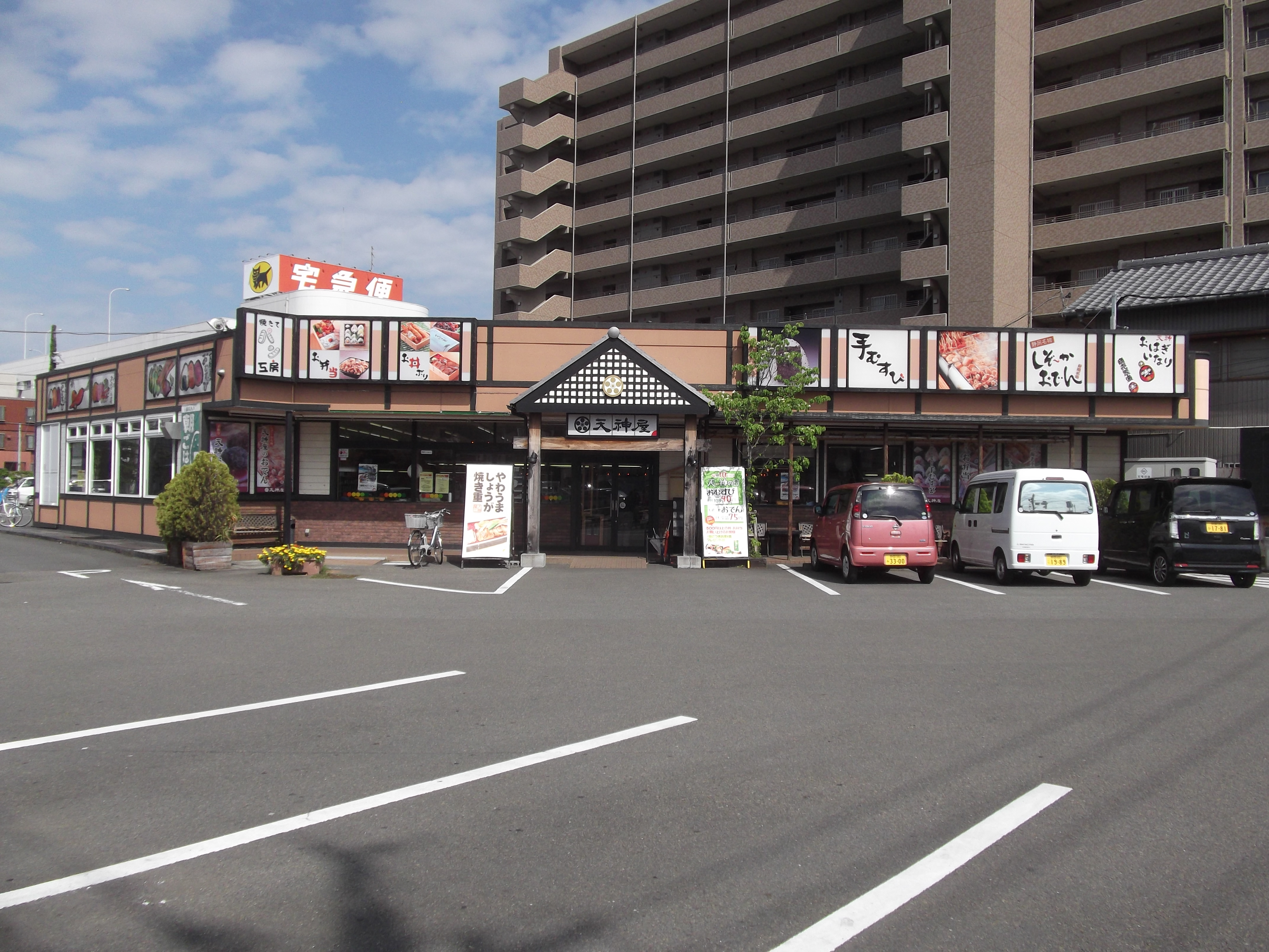 天神屋本社。